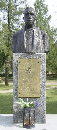 Karol Brzostowski - pomnik w Sztabinie